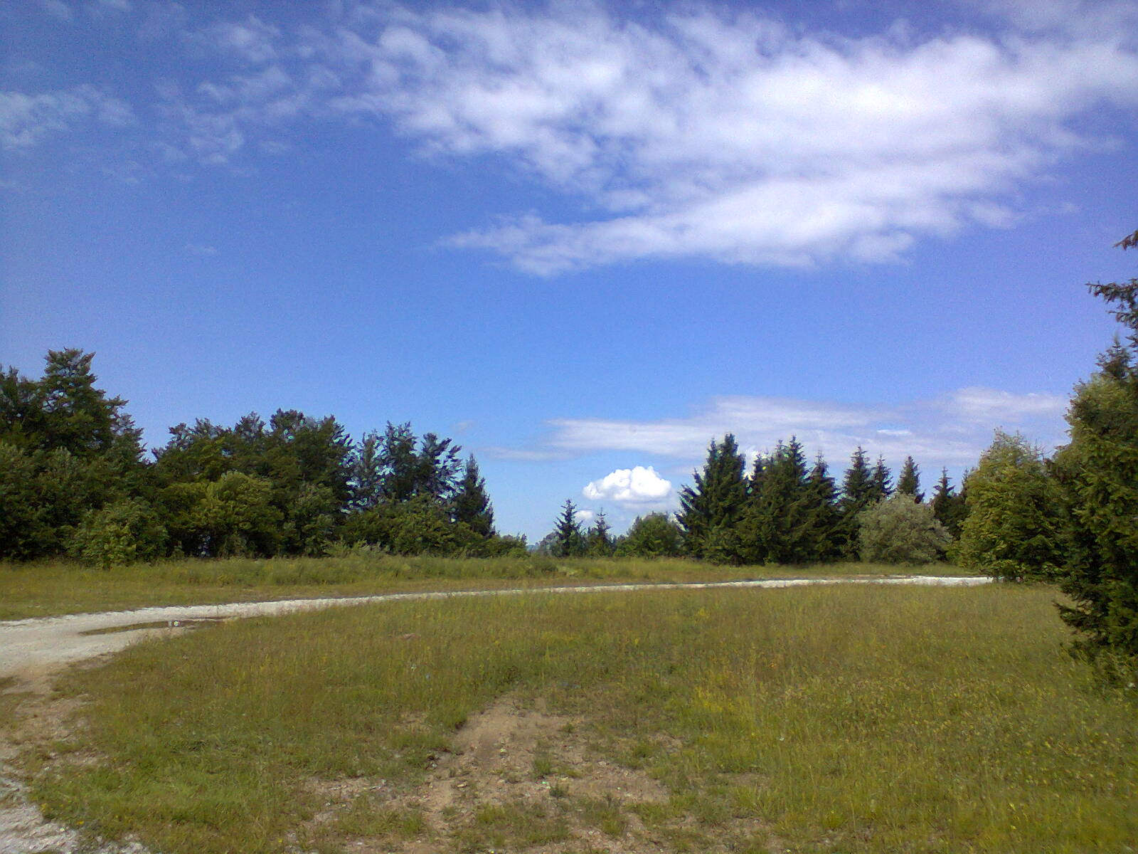 Vrh Pasje ravni.